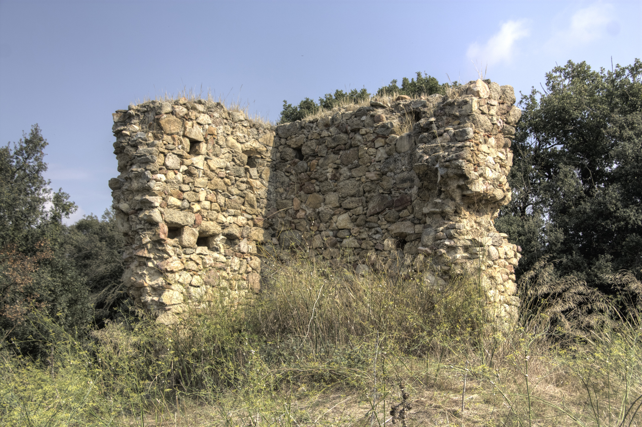 Castell de Vilaüt, a Pau (Alt Empordà)